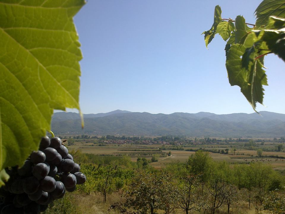 Srpski (latinica): Vinogradi, selo Todorovca